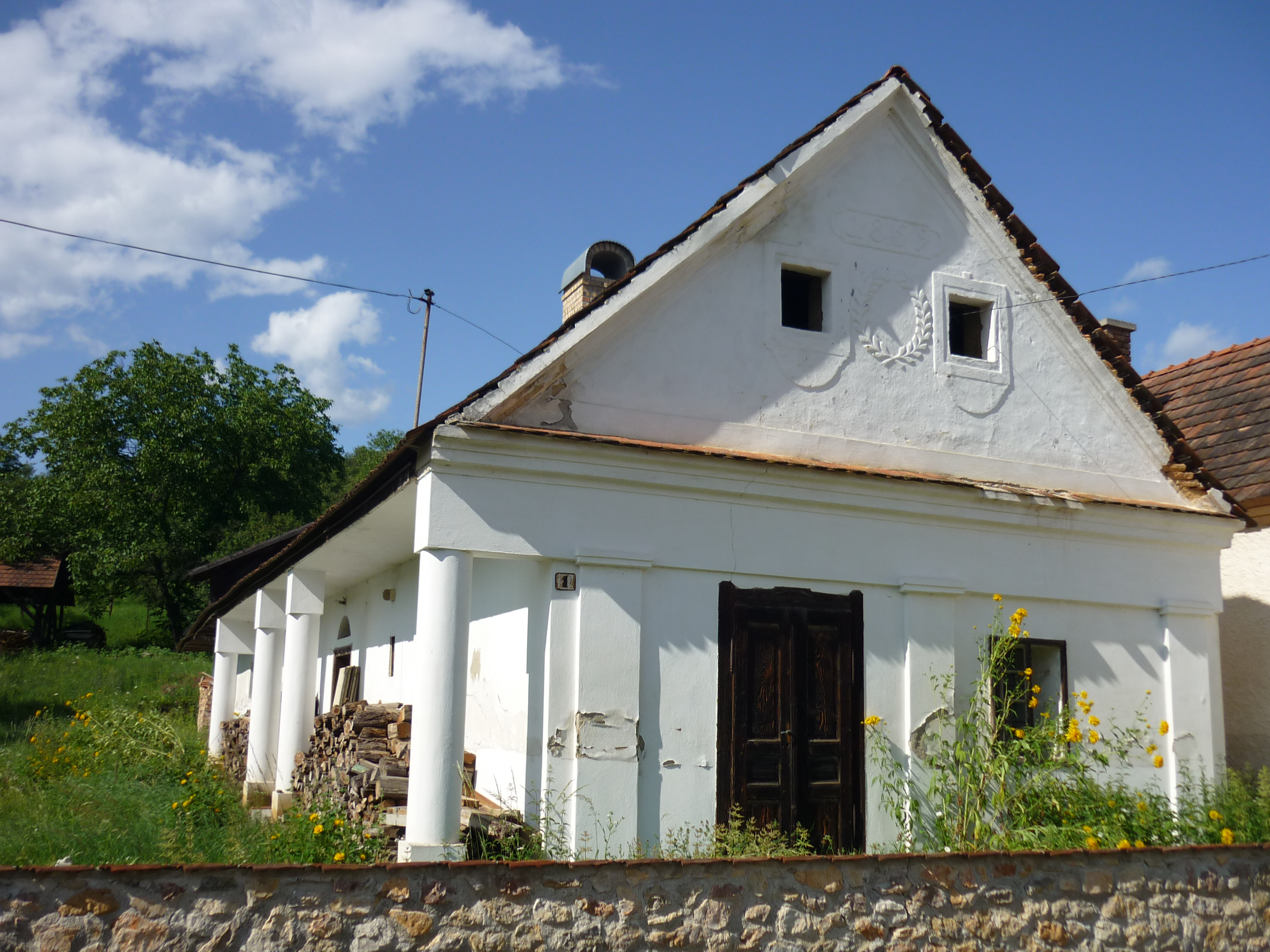 A 19. század végén épült, perkupai stílusú parasztház Égerszög főutcáján This is a photo of a monument in Hungary, Identifier: 2751